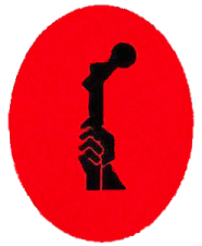 Einheitsverband der Eisenbahner Deutschlands : Titelblattausschnitt aus Einheitsverband der Eisenbahner Deutschlands: Jahrbuch 1929 des Einheitsverbandes der Eisenbahner Deutschlands. Verlagsgesellschaft Deutscher Eisenbahner, Berlin, 1930